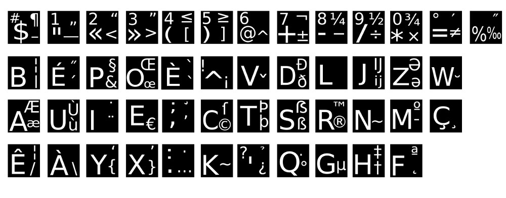 Planche de caractère Bépo à coller sur les touches d'un clavier.